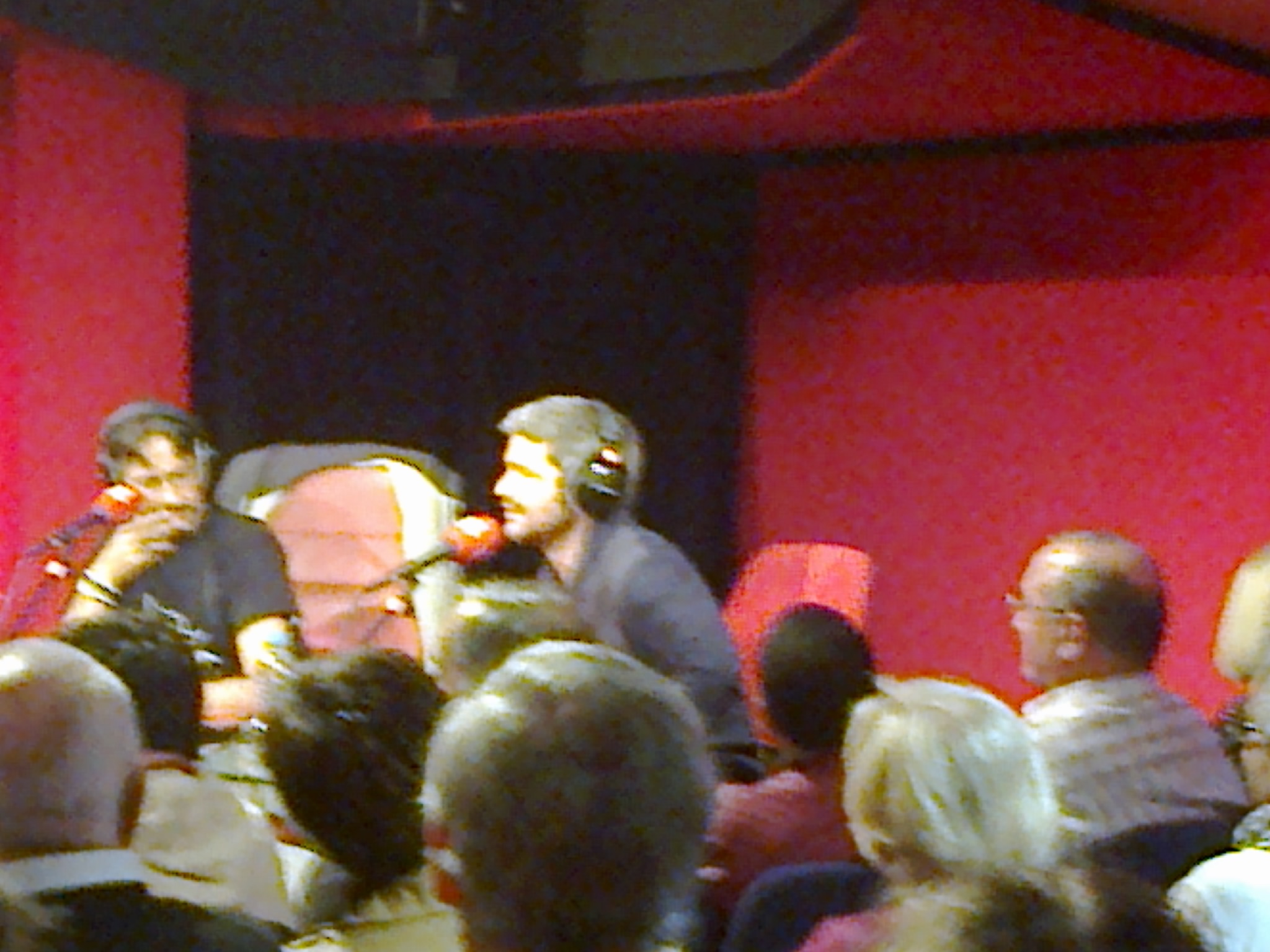 Le chanteur Grégoire aux Grosses Têtes le 07 octobre 2014.